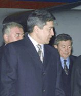 Imangali Tasmagambetov, Prime Minister of Kazakhstan